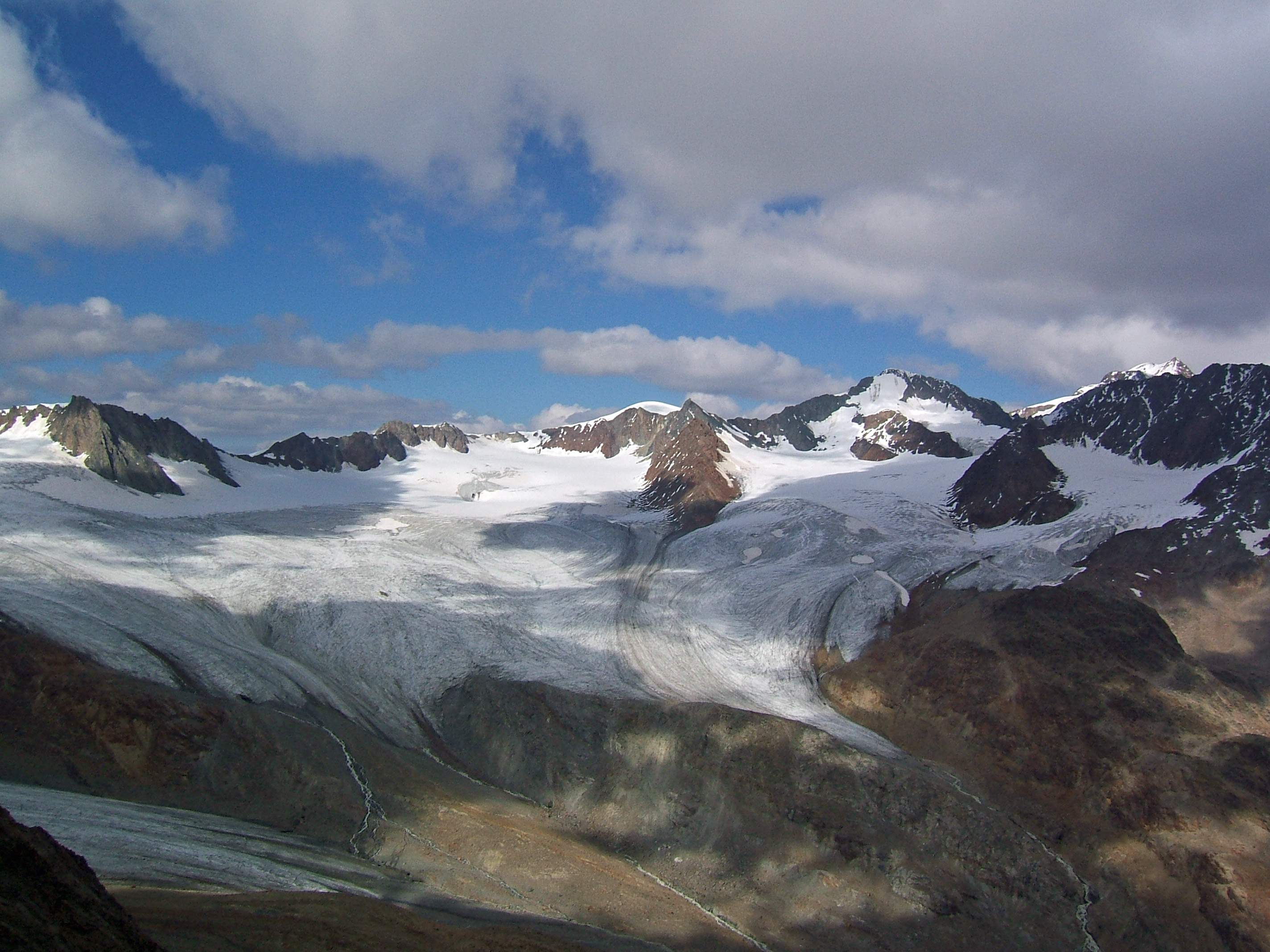 Vernagtferner vom Gintergrasleck